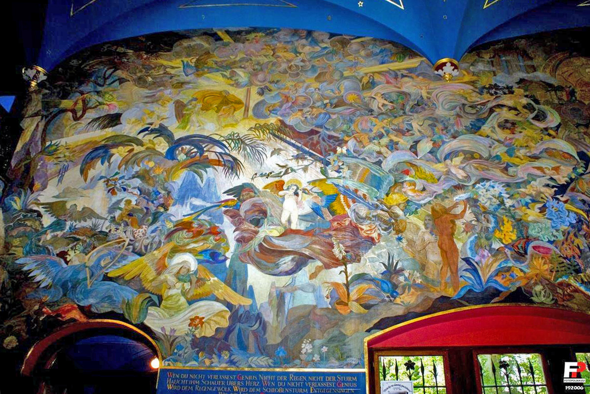 Widok frontalny głównego malunku. Co do "wielkości" tego dzieła to zdania są podzielone!